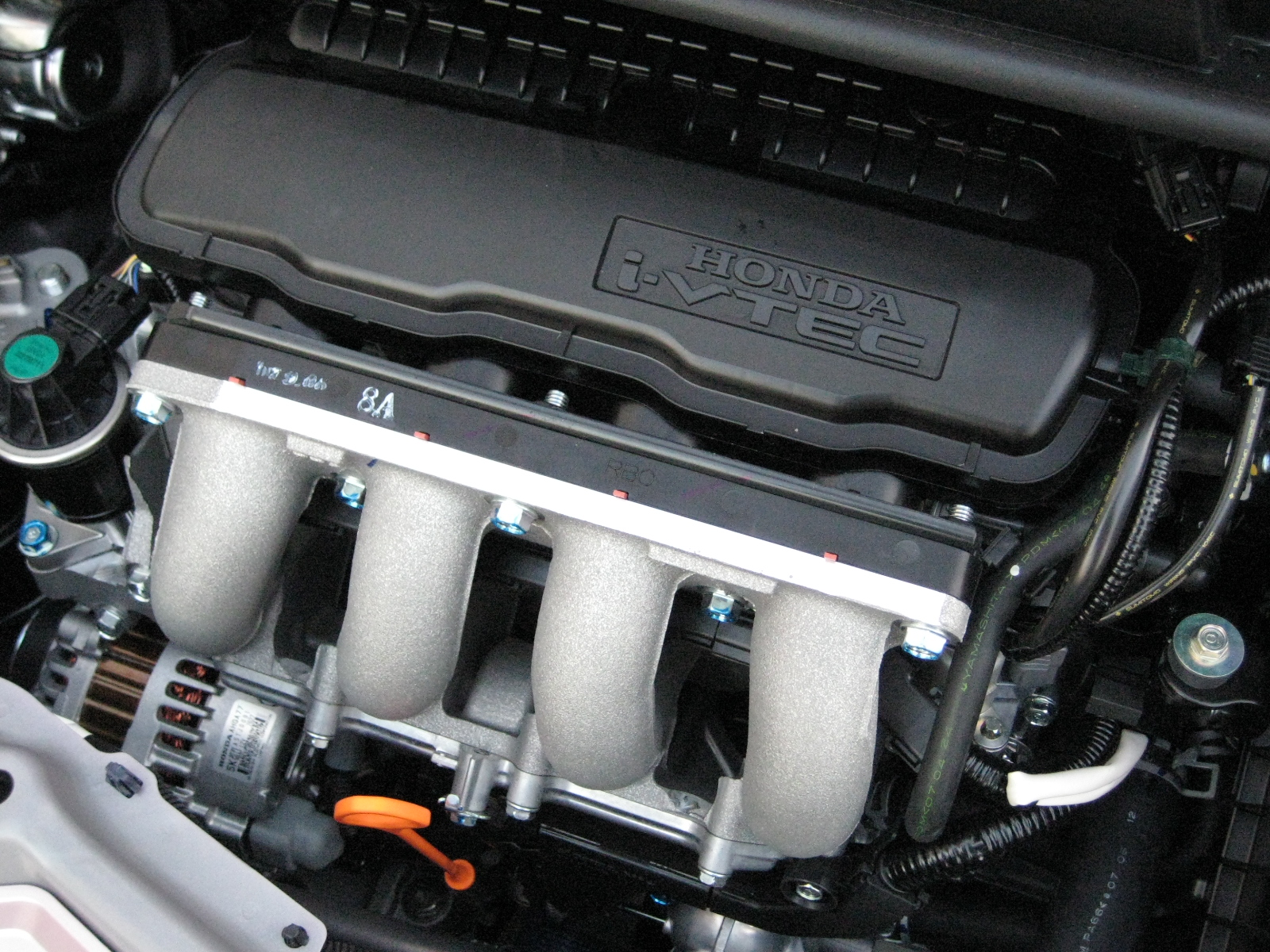 Honda L13A 1.3L SOHC i-VTEC Engine on 2007 Honda Fit